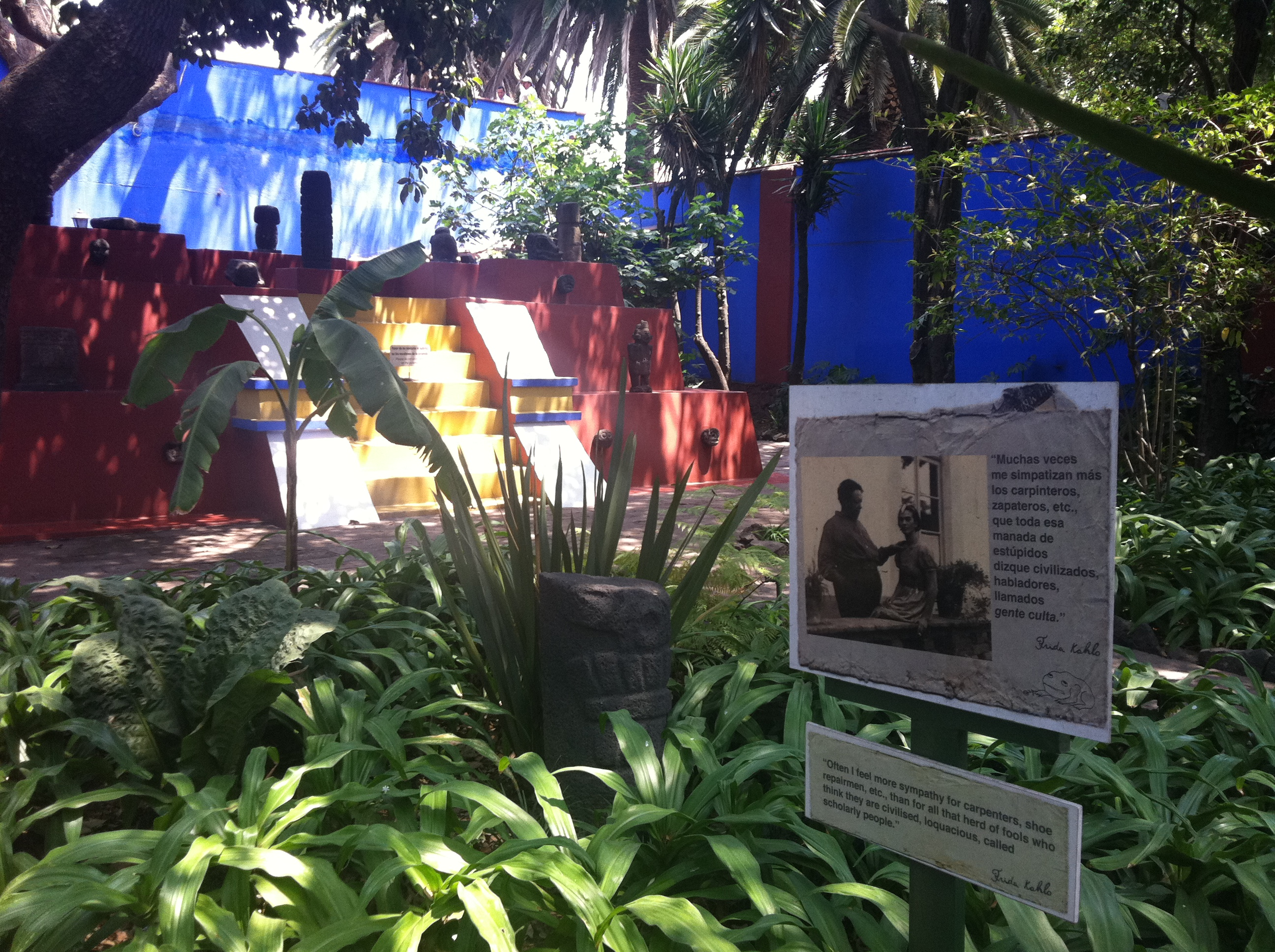 Roca Frida Kahlo